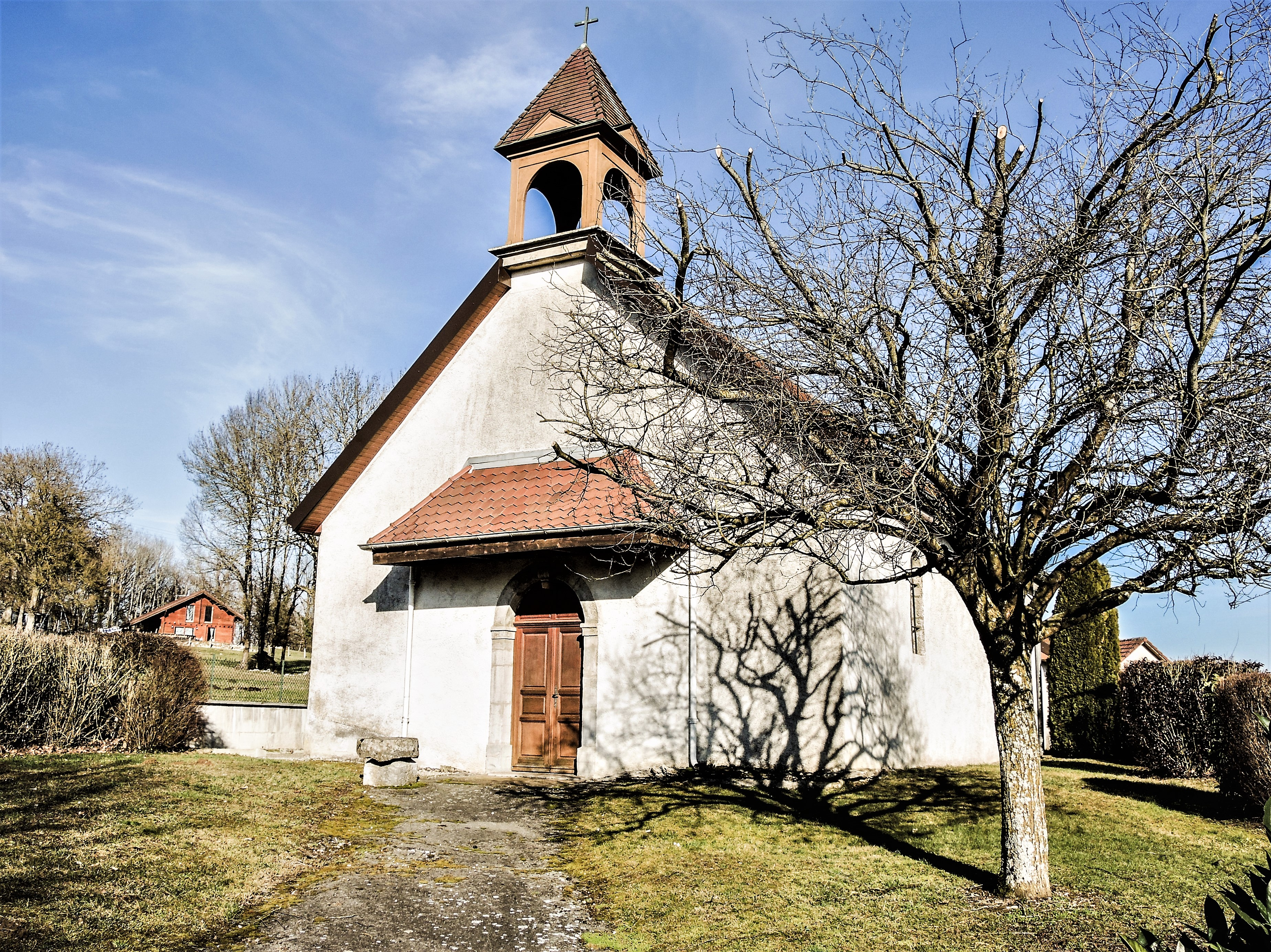 Chapelle Saint-Ermenfroi à Santoche. Pays de Clerval. Doubs